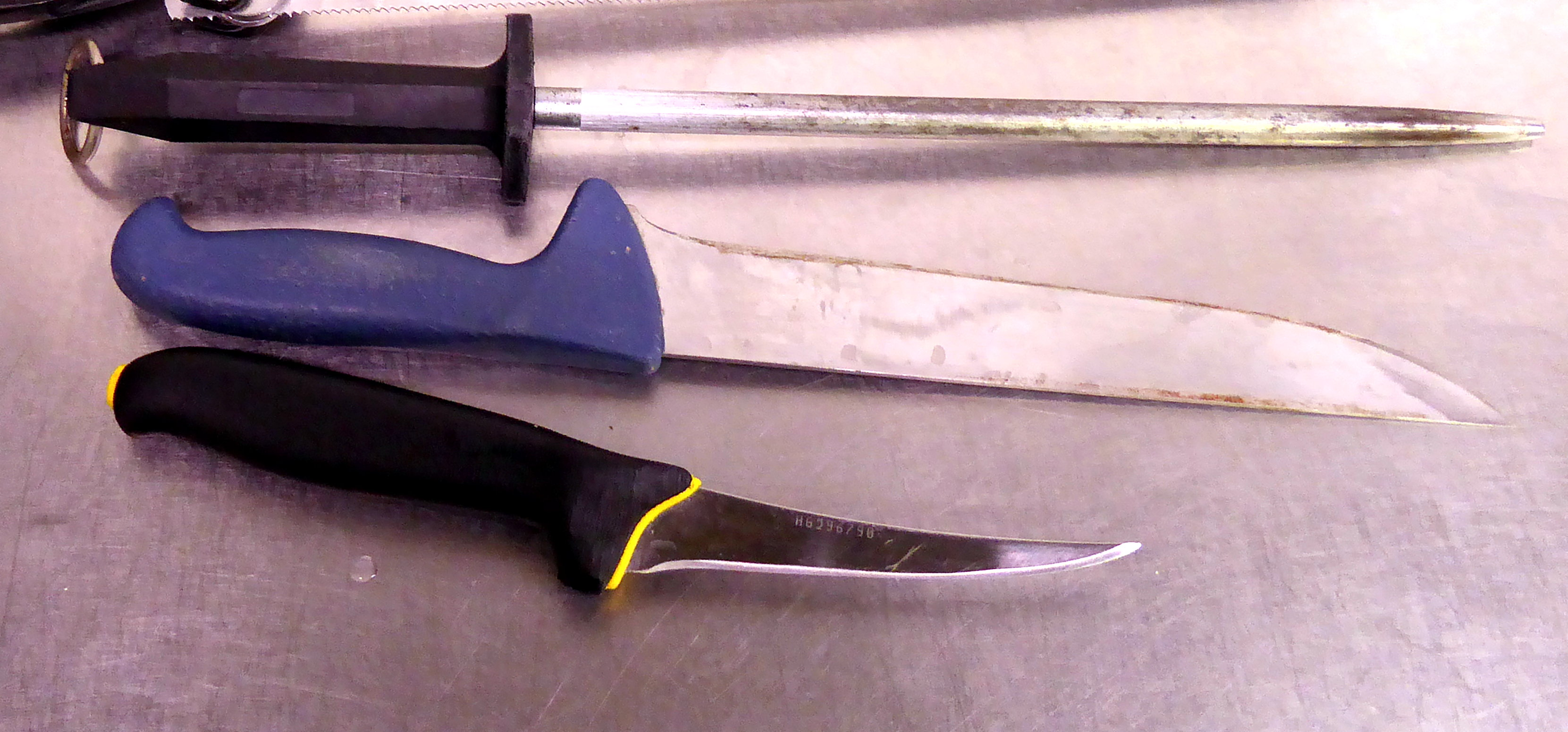 Wiki Loves Mett: Fleischerwerkzeuge, von oben: Wetzstahl, Fleischmesser, schmales Ausbeinmesser.